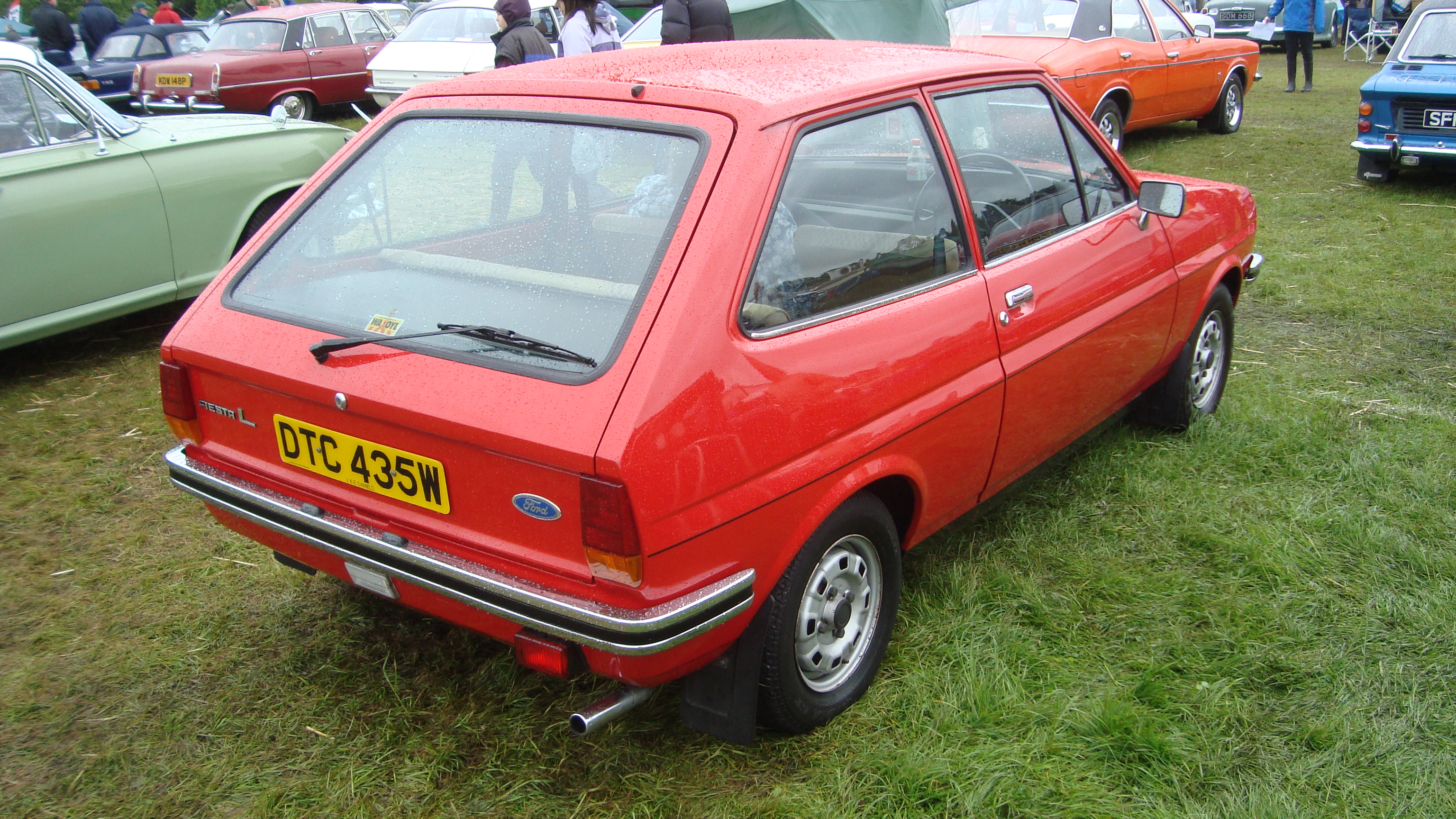 1980 Ford Fiesta 957 HC L